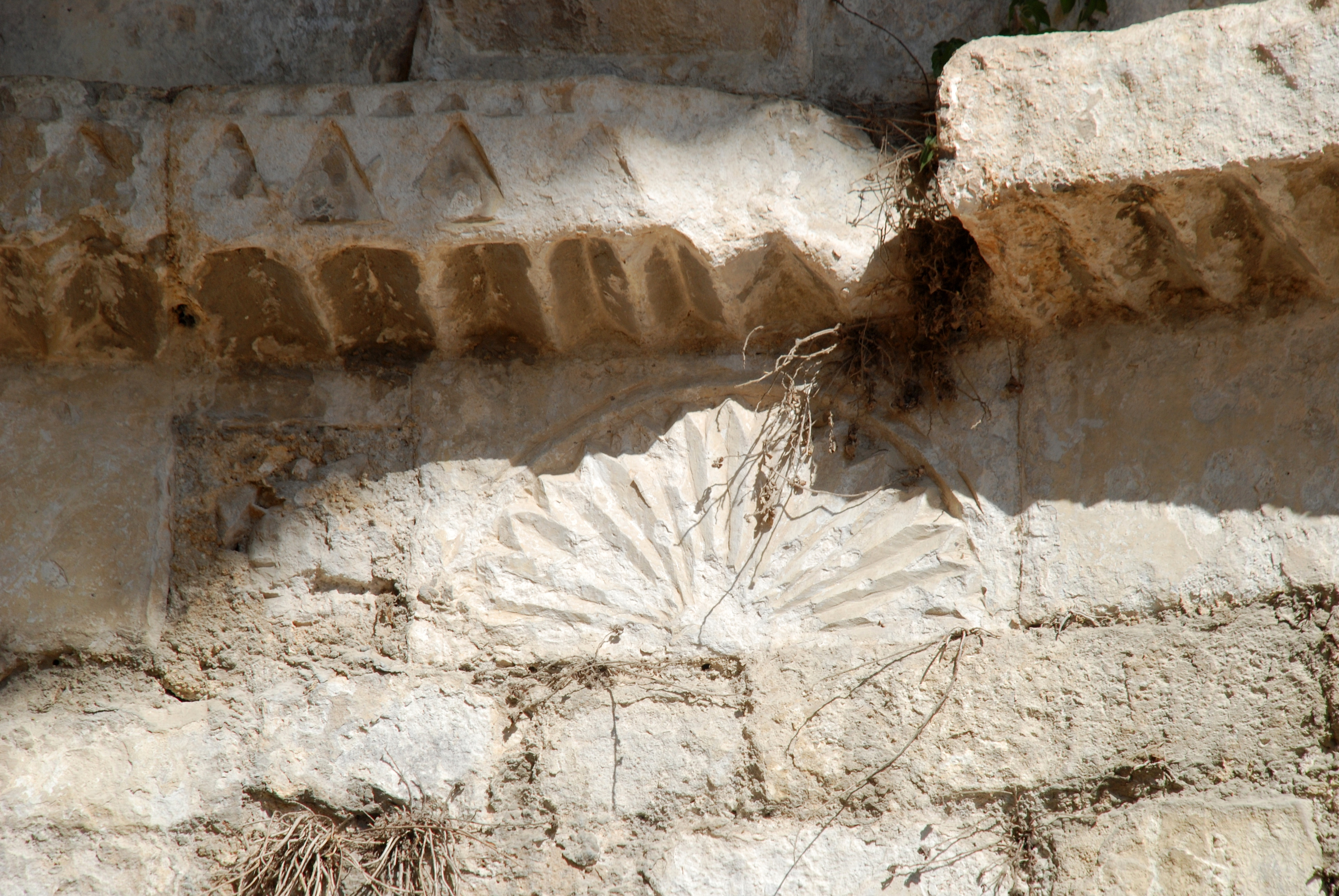 France - Provence - Chapelle Saint-Véran d'Orgon